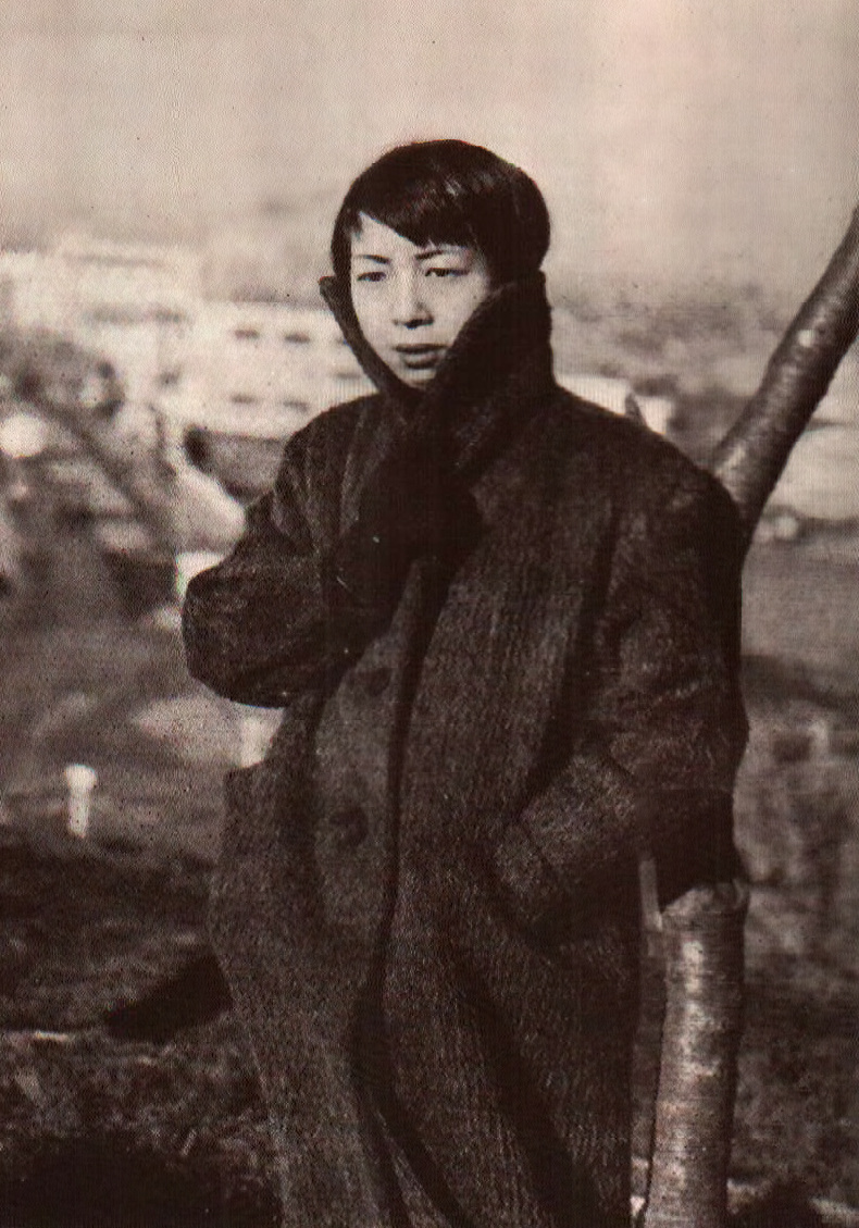 作家・原田康子の写真。1956年11月、北海道釧路市